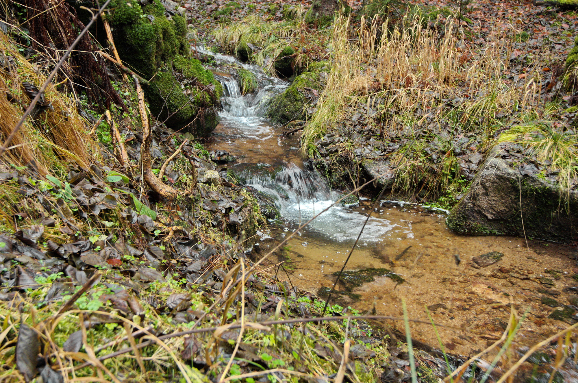 Rychnovský potok, přítok Lobezského potoka, Slavkovský les, okres Sokolov